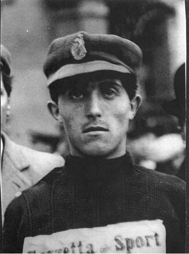 Il marciatore italiano Donato Pavesi in una foto d'epoca.